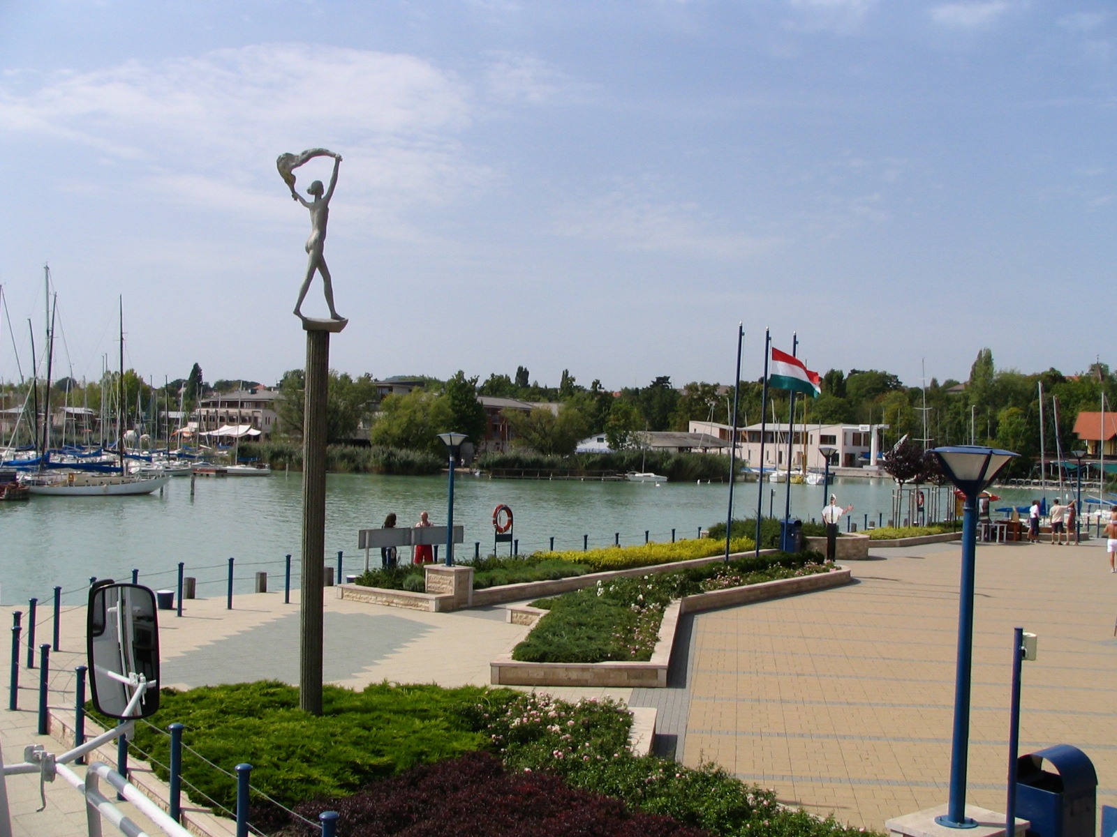 Balatoni szél. Borsos Miklós mű, 1961. - Magyarország, Veszprém megye, Balatonfüred, Vitorlás tér (A Balatonfüredi hajóállomáson.)